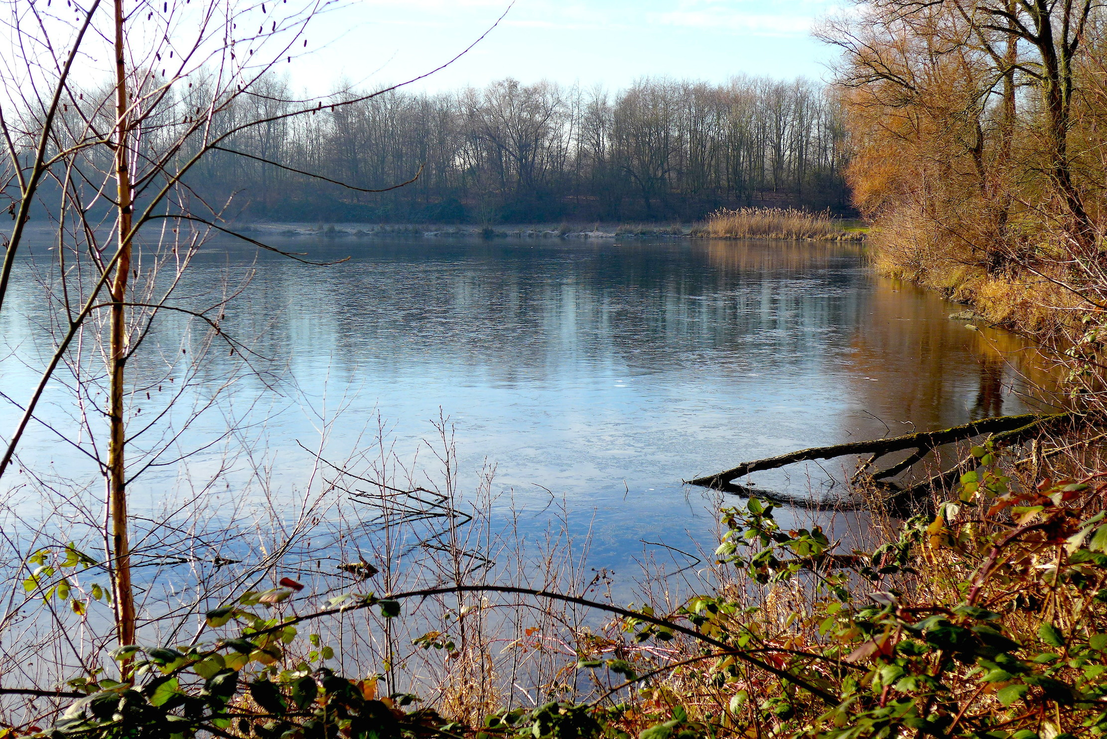 Рукотворное озеро Флиднер в Кайзерсверте (Дюссельдорф).